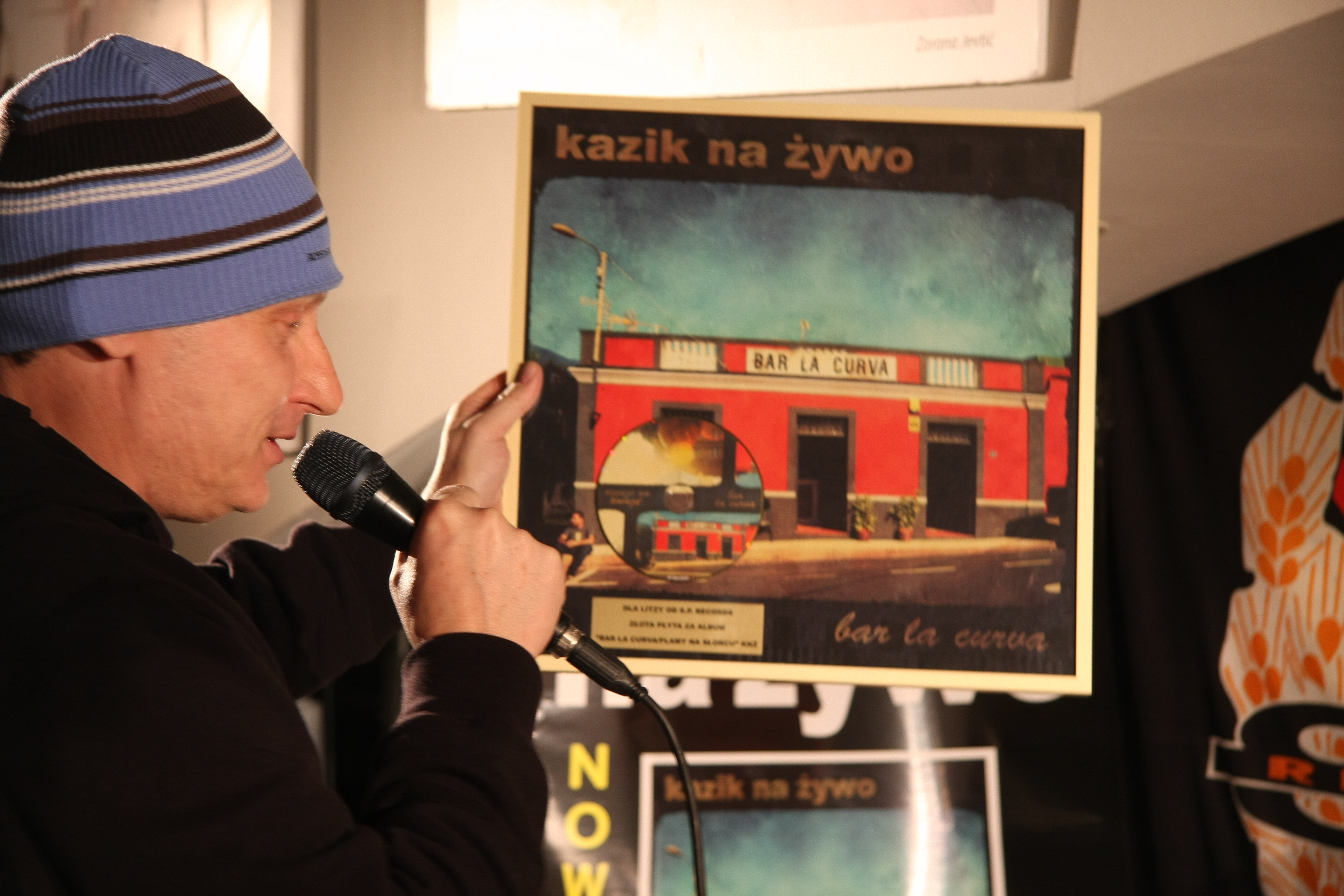 Sławek Pietrzak wręczający złotą płytę Bar La Curva / Plamy na słońcu zespołu Kazik na Żywo 5 grudnia 2011 roku w warszawaskim Teatrze Rozmaitości